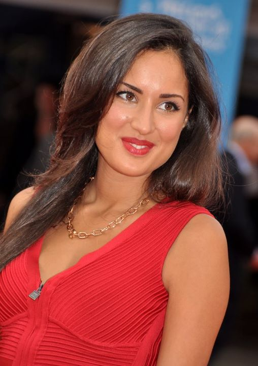 Sarah Kazemy au festival de Deauville